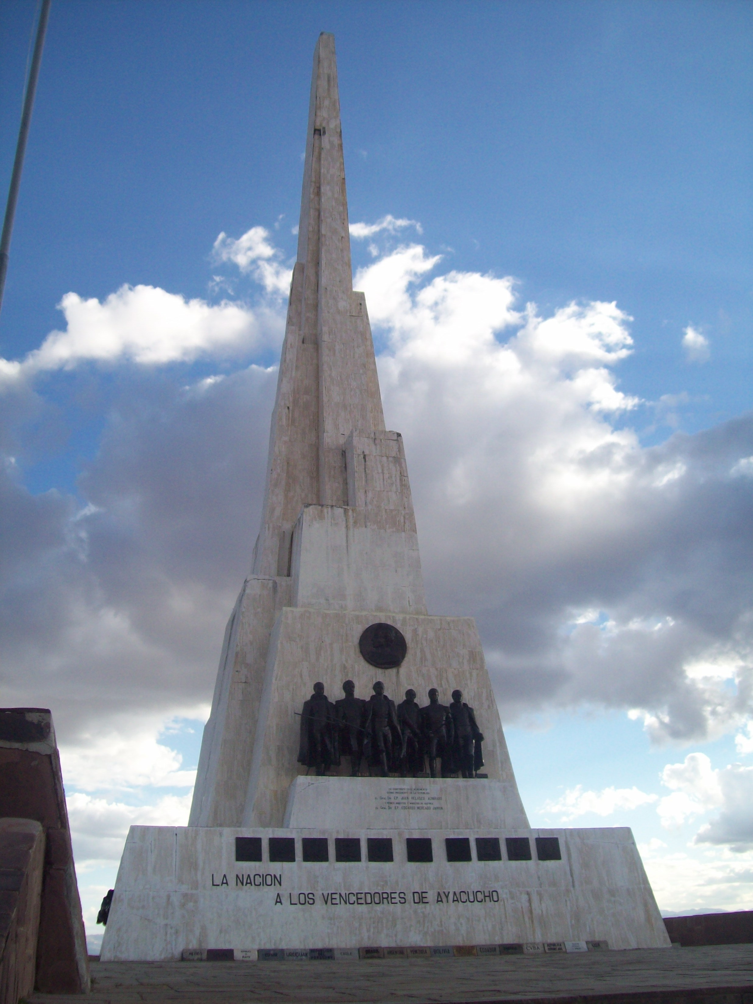 Obelisco de la Pampa de la Quinua